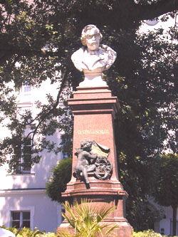 Weiden in der Oberpfalz (Bayern): Das Gustav von Schlör -Denkmal steht zwischen der Jubiläumseiche vom Jahr 1824, die zum 25jährigen Regierungsjubiläum König Max I. gepflanzt wurde und der Friedenseiche vom Jahr 1871. Es erinnert an den letzten bayerischen Handelsminister Gustav von Schlör (1820 - 1883), der 1863 den Eisenbahnanschluß Weidens erreichte und damit den wirtschaftlichen Aufschwung der Stadt begründete. Der Entwurf des Denkmals stammt von Architekt Carl Hocheder, München, die Marmorbüste von Bildhauer Theodor Haf. Bild: Stadt Weiden in der Oberpfalz - Lizenz: GNU-FDL